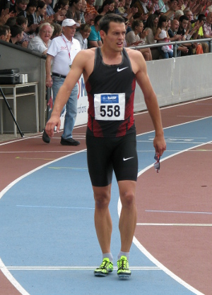 Georg Fleischhauer beim DLV WM-Testwettkampf 2011 im Stadion der MTG Mannheim.